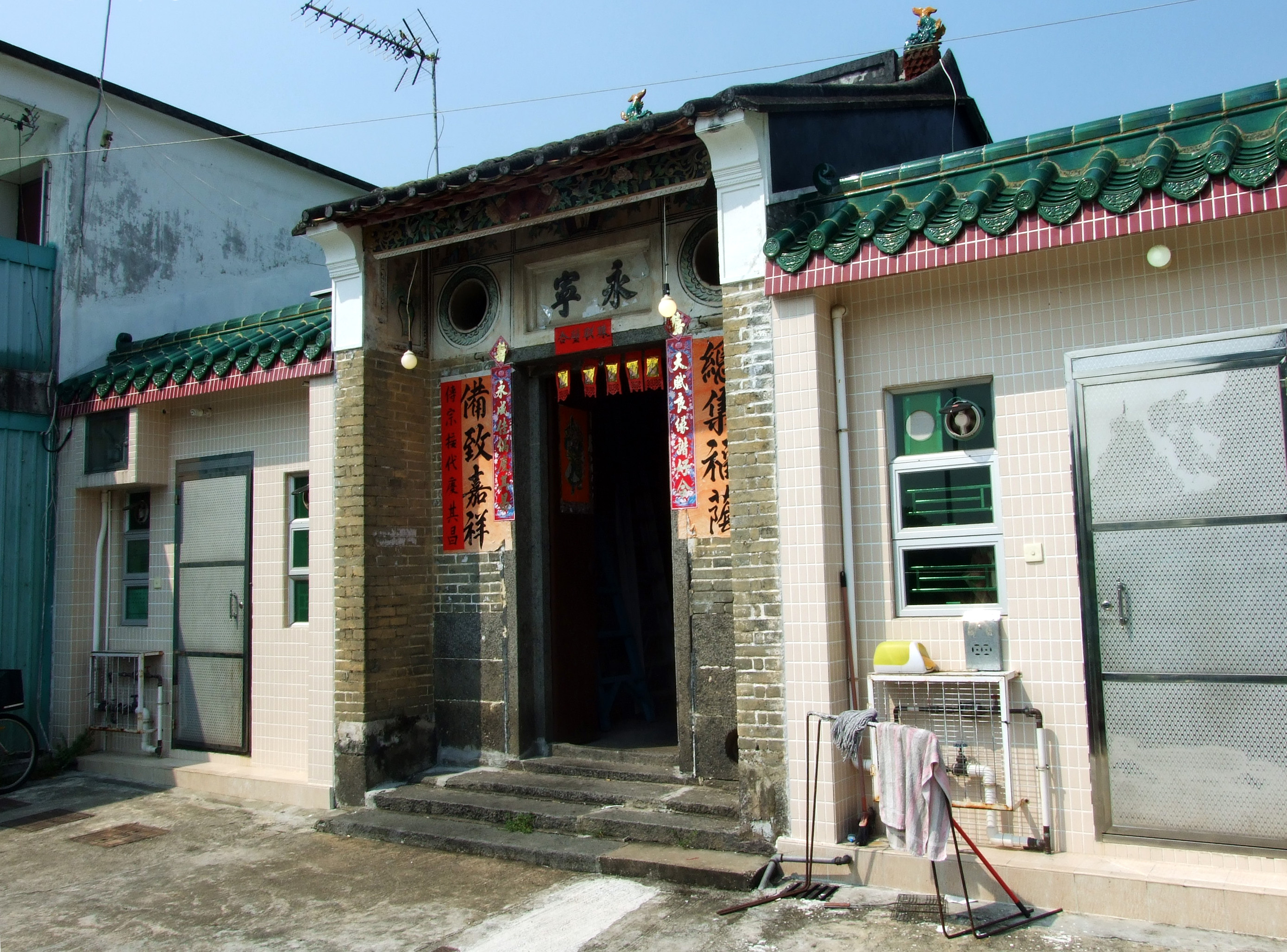 中文（香港）: 永寧里圍門